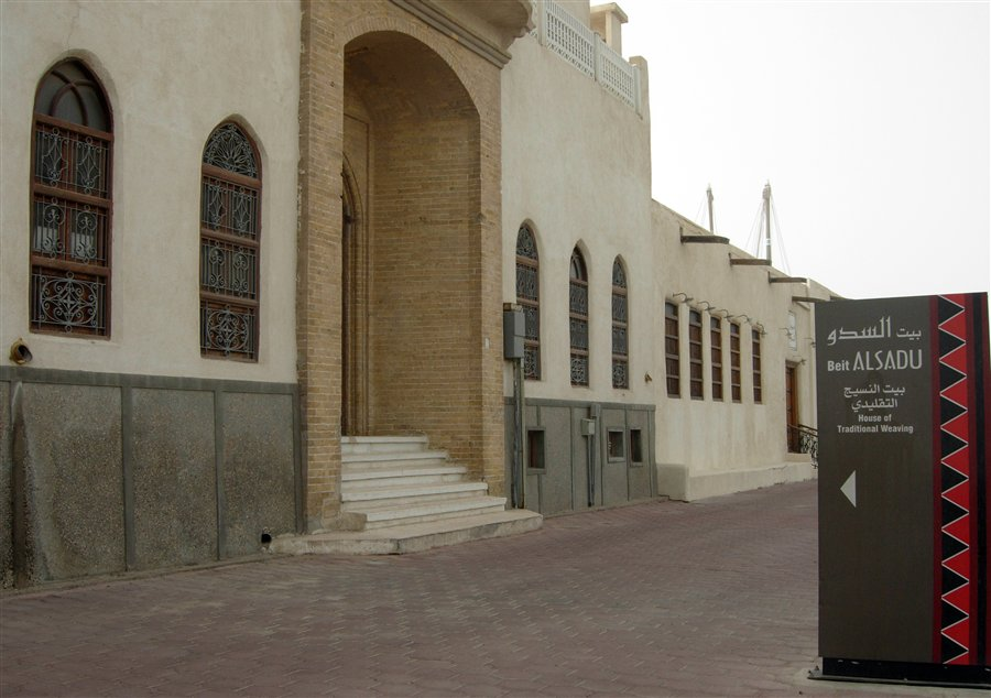 beit alsadu